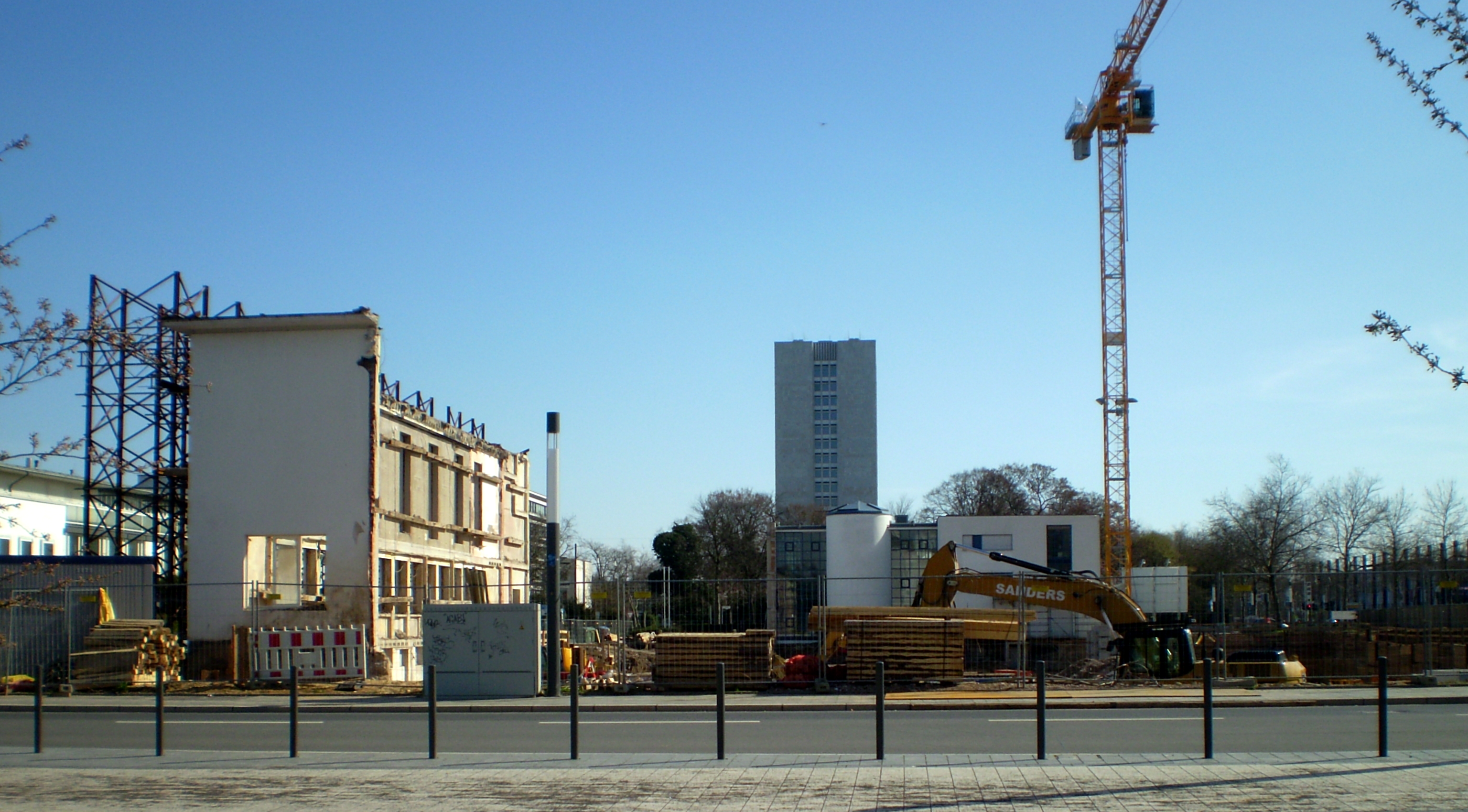 Baufeld des Bürobaus brandtelf mit Fassadenteilen der ehemaligen Landesvertretung Baden-Württembergs, Bonn: Ansicht von der Welckerstraße